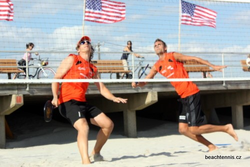 Eda a honza v usa beach